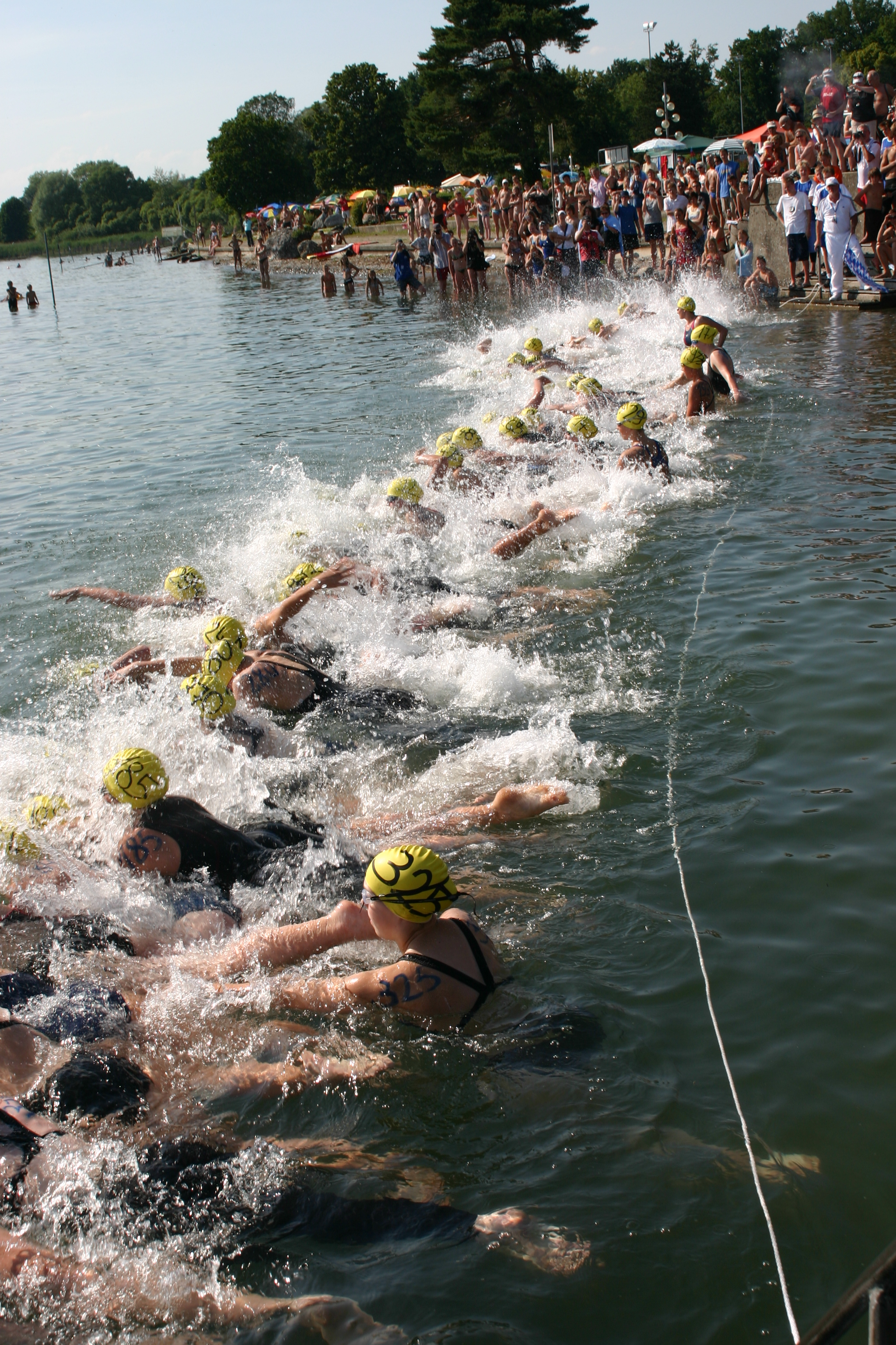 DM Freiwasserschwimmen; 19. Juni 2009 in Lindau am Bodensee